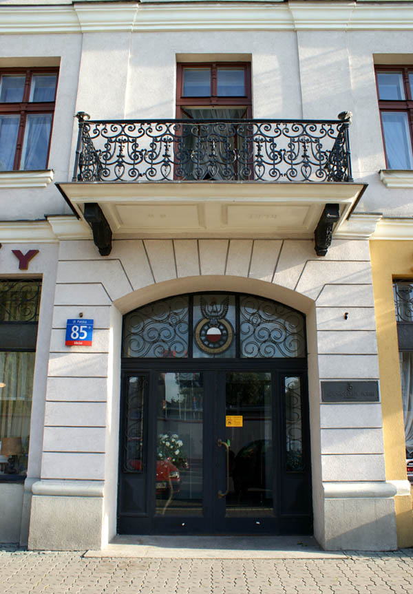 Budynek przy ulicy Pańskiej 85 w Warszawie - grał w serialu Dom w odcinkach 1-12 kamienicę przy ul. Złotej 25